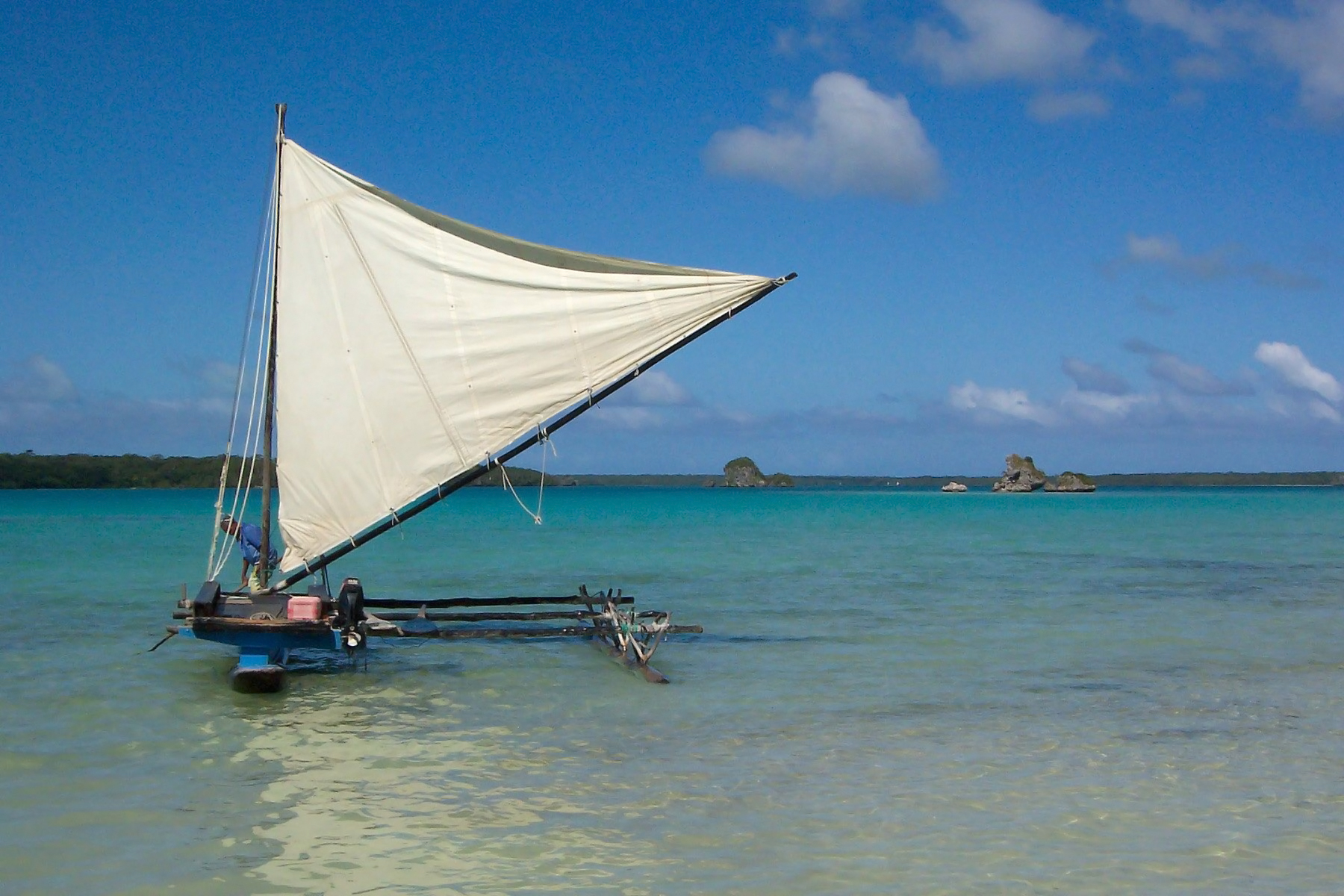 Pirogue traditionnelle de l'Île des Pins près de Nouméa en Nouvelle-Calédonie